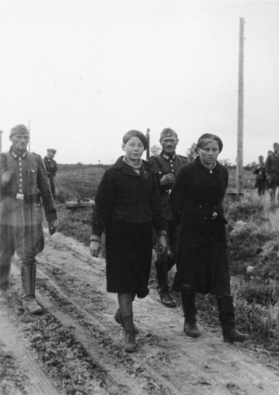 Russland, verhaftete weibliche Zivilisten An der Sowjetfront: Polizei im Kampf gegen Banditen. Auch Flintenweiber beteiligen sich an den Überfällen und Plünderungen der Banditen. Sie werden zum Verhör abgeführt. September 1942 [Sowjetunion.- Zwei festgenommene sowjetische Frauen auf einer unbefestigten Landstraße unter Bewachung durch deutsche Polizisten (Ordnungspolizei)]